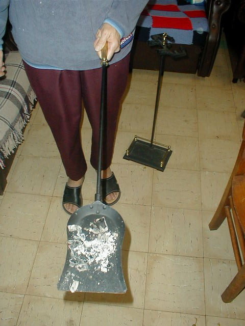 Walon: trait-feu